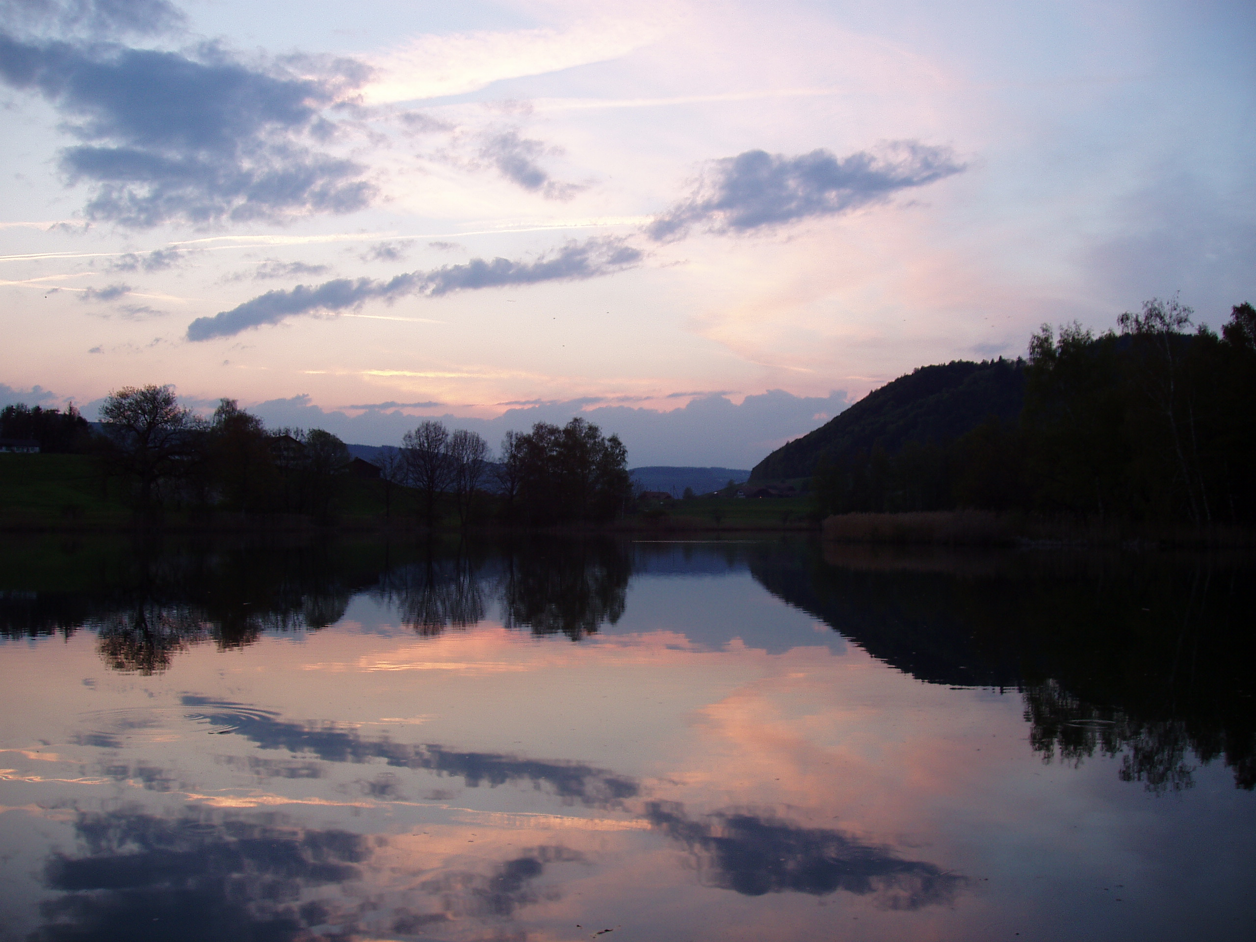 Gerzensee